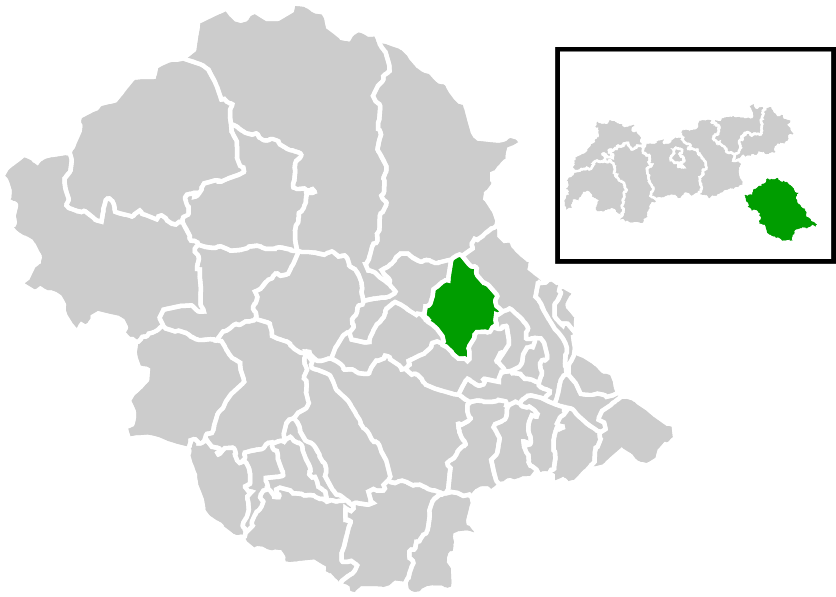 Lage der Gemeinde innerhalb des Bezirks Lienz